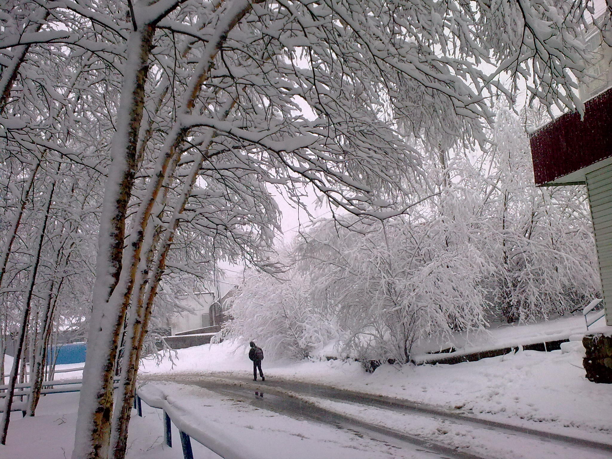 Весенний_снег_Тында_2010